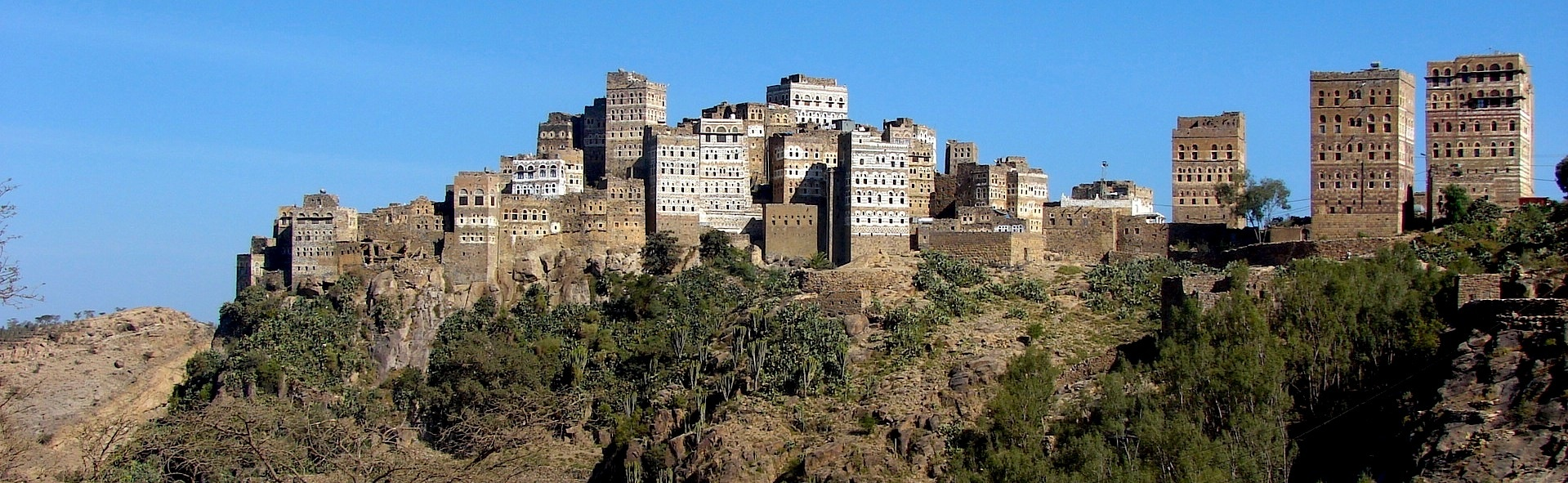 Village On Hajjaz Mountains Yemen